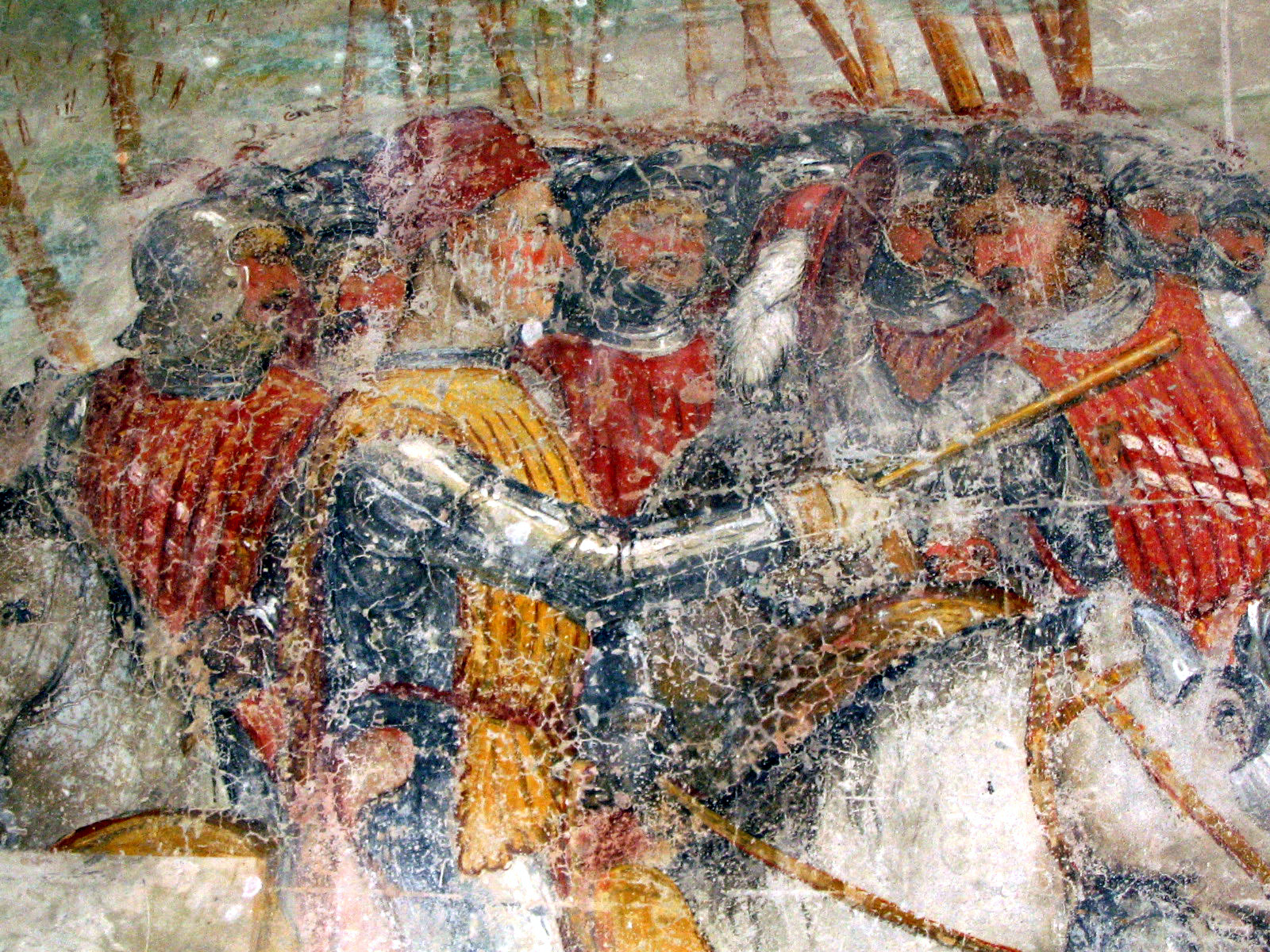 Il Romanino (attribuito a): La battaglia della Riccardina [1467]. Affresco nel Castello di Malpaga, già di Bartolomeo Colleoni. Particolare: Bartolomeo Colleoni. Foto di Giorces.